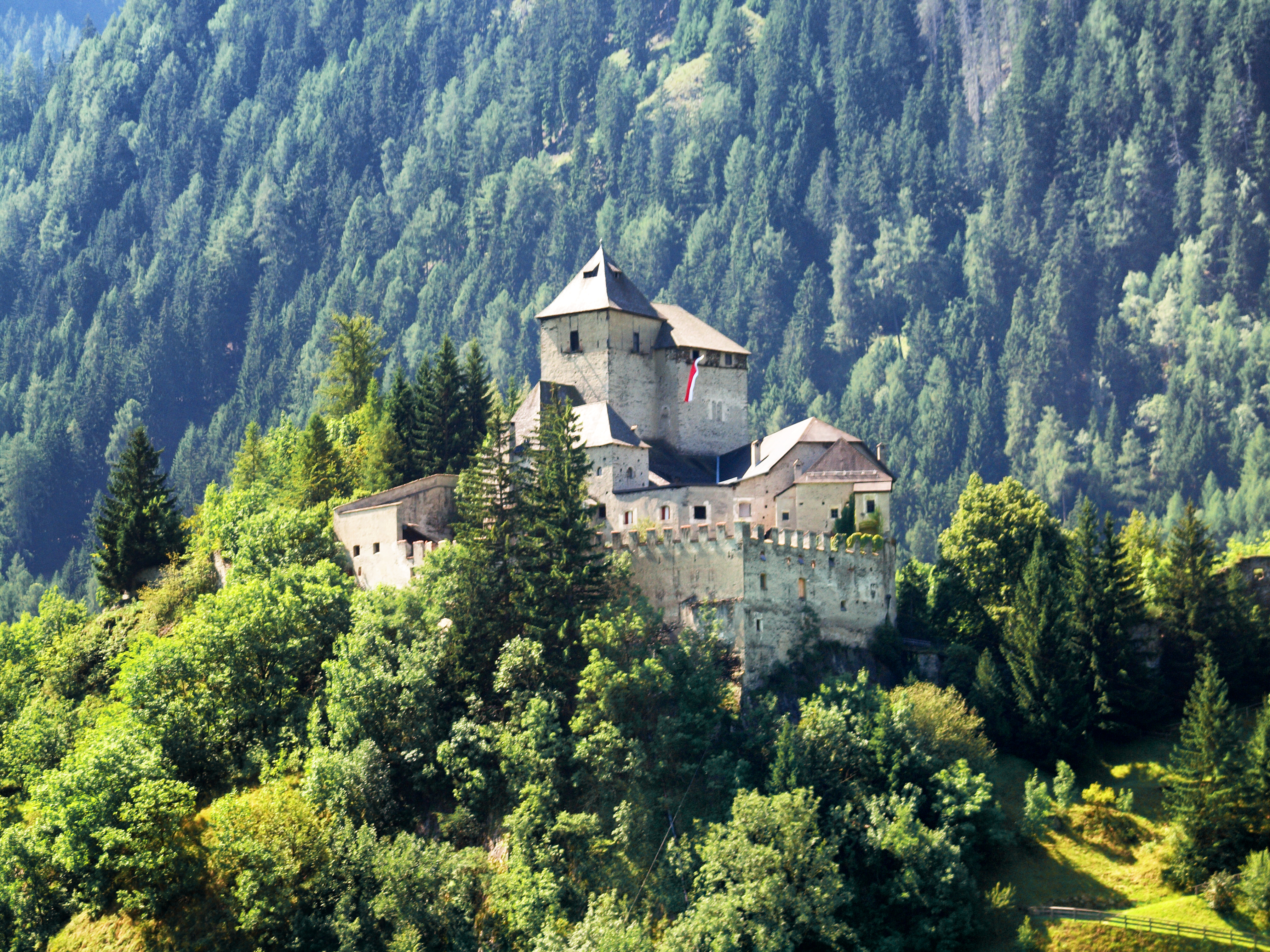 Vipiteno, Province autonome de Bolzano (Italie) - Château de Tasso